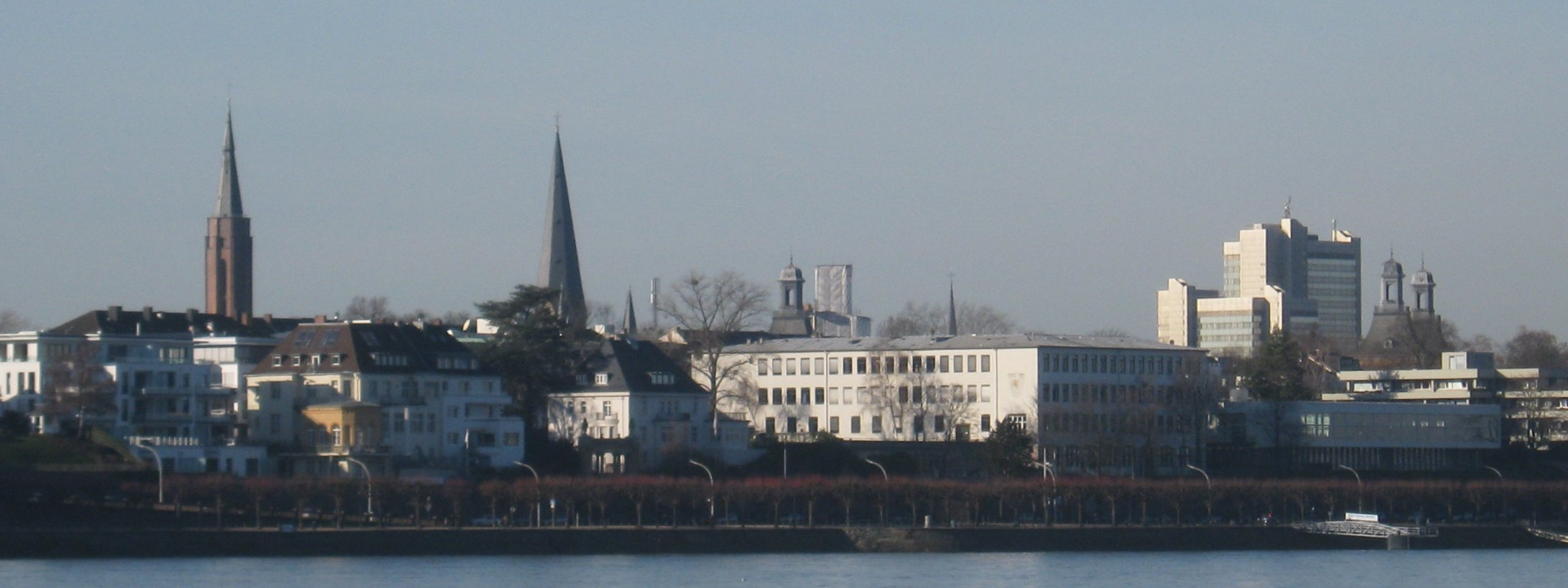 Ansicht der Bonner Innenstadt mit Kreuzkirche, Münster Universität und Stadthaus, aufgenommen vom Beuler Rheinufer.